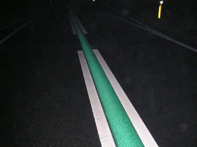 Groene middenstreep op N36, met onderbroken witte lijnen, nachtfoto